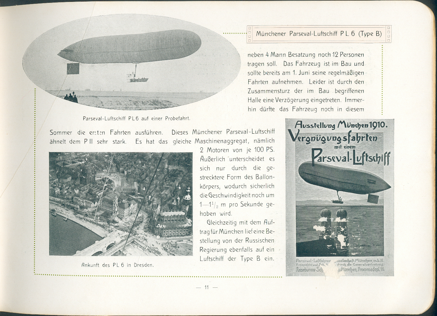 Parseval-Luftschiff PL 6 in München